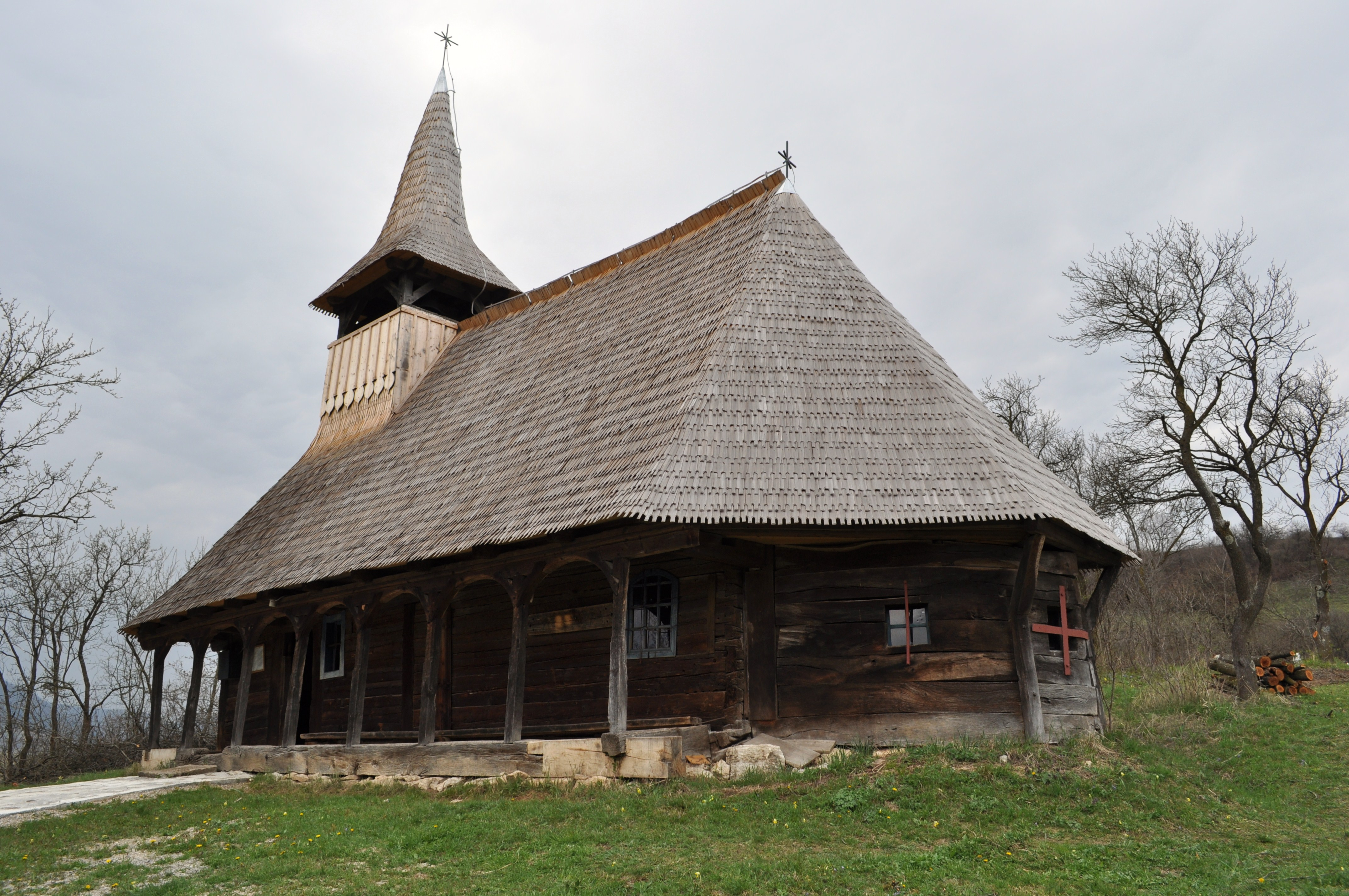 Die Holzkirche Sfinții Trei Ierarhi von Straja, Kreis Alba in Rumänien